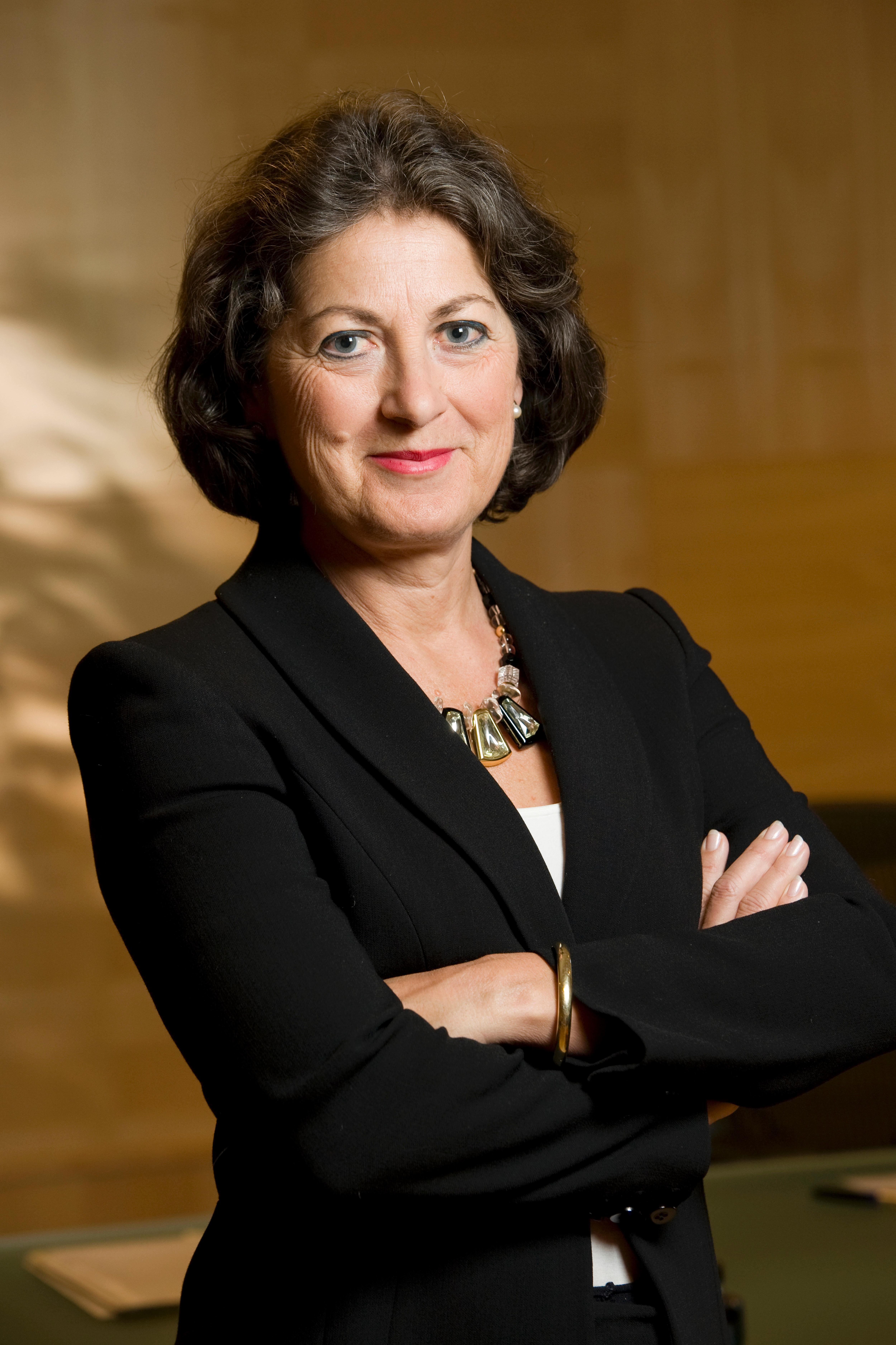 Staatssecretaris van Volksgezondheid, Welzijn en Sport Marlies Veldhuijzen van Zanten-Hyllner